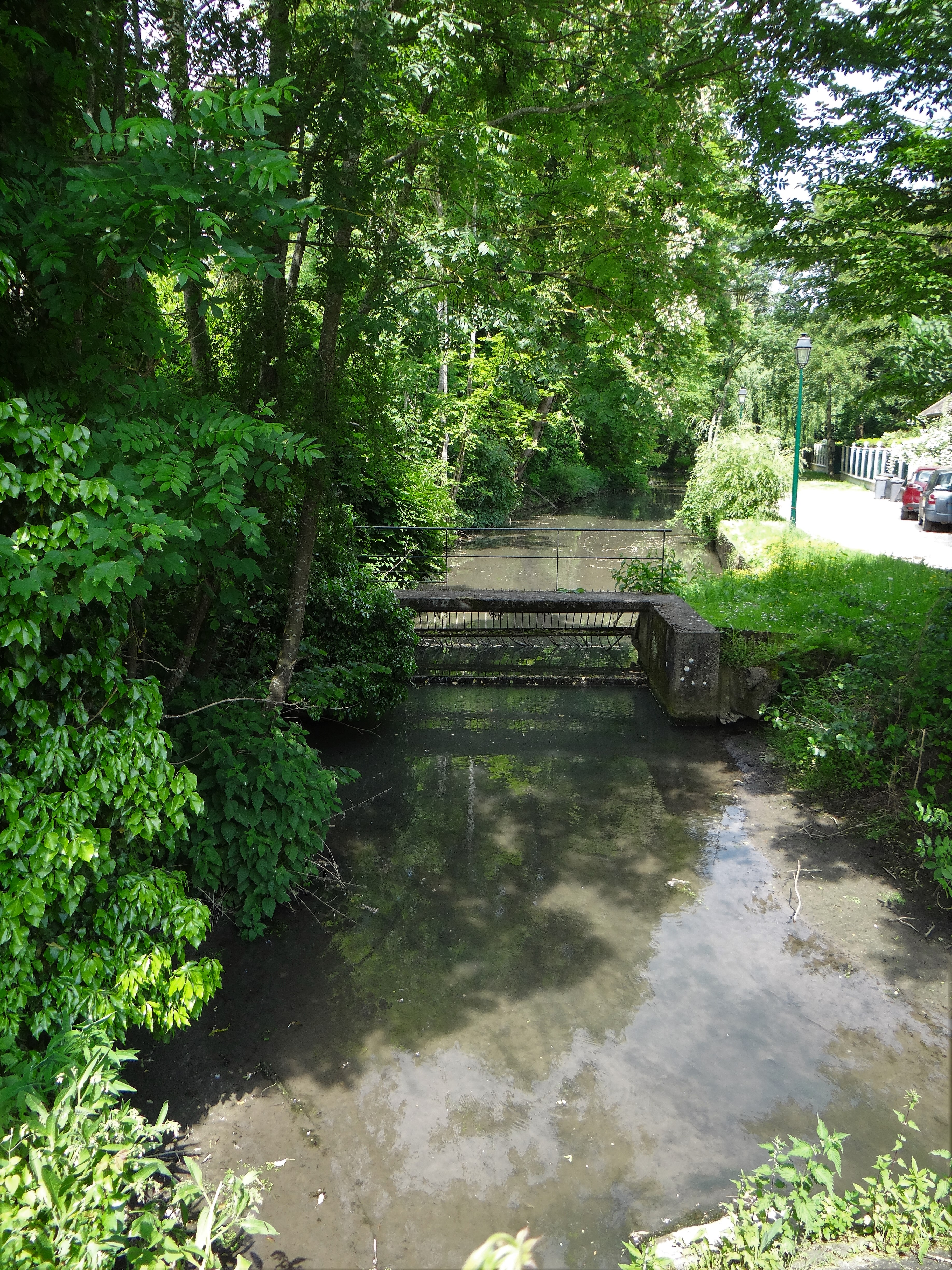 La Beuvronne à Gressy, Seine-et-Marne, France.